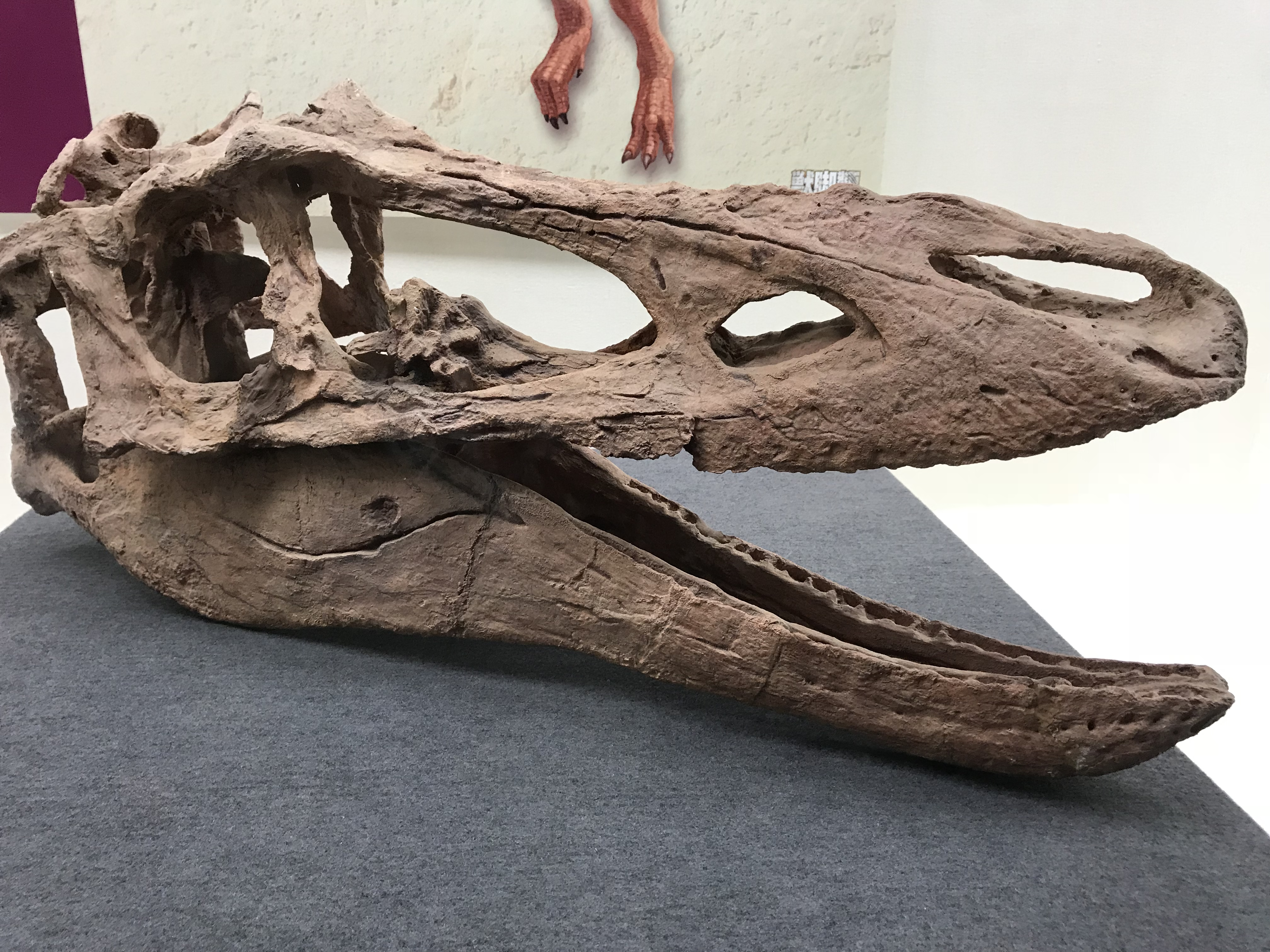 恐竜の頭骨。